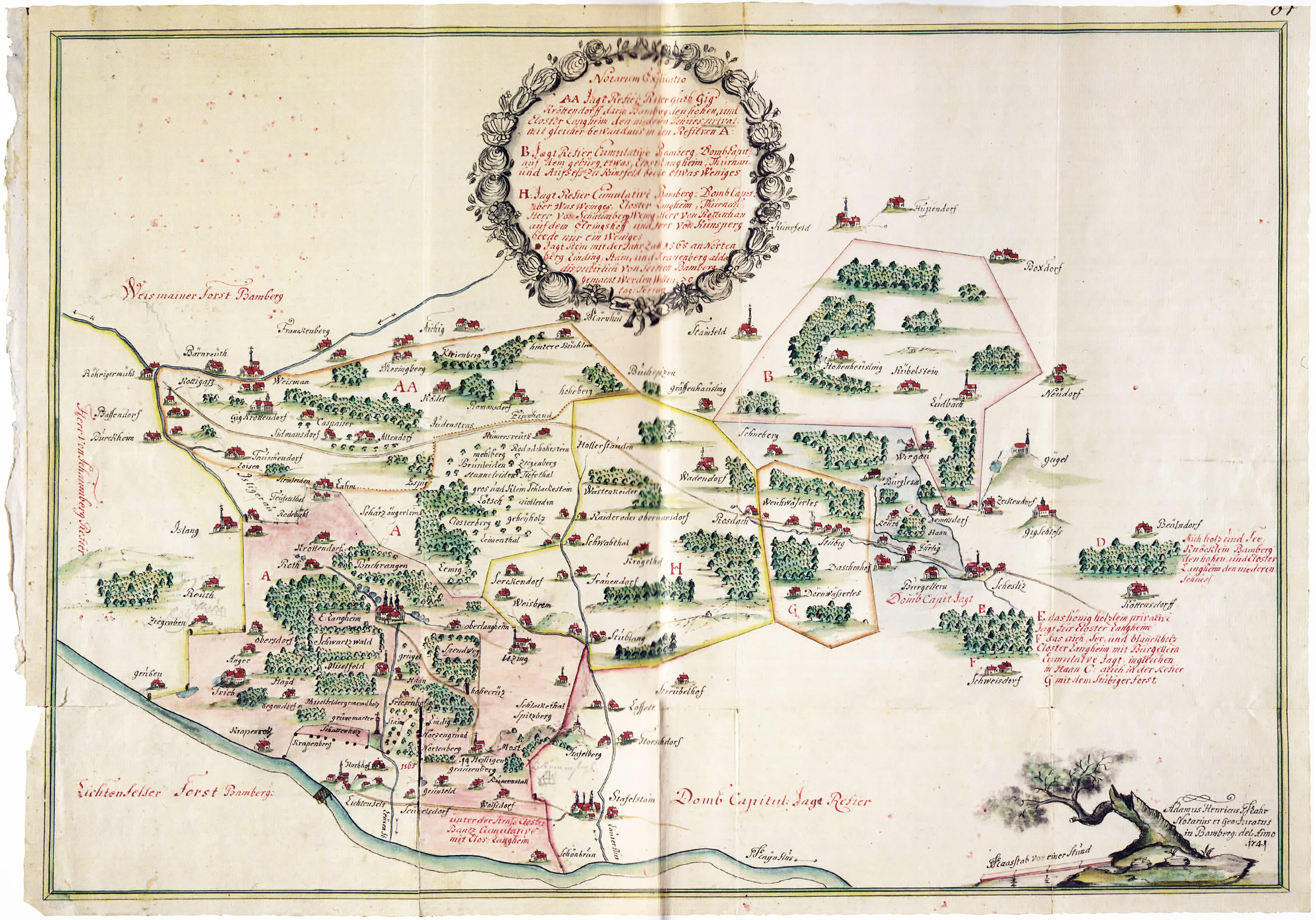 Teilscan zum Stitchen einer Karte über die Oberfränkische "Judenstras" von Altenkunstadt/Röhrig über den Kordigast und weiter nach Scheßlitz.